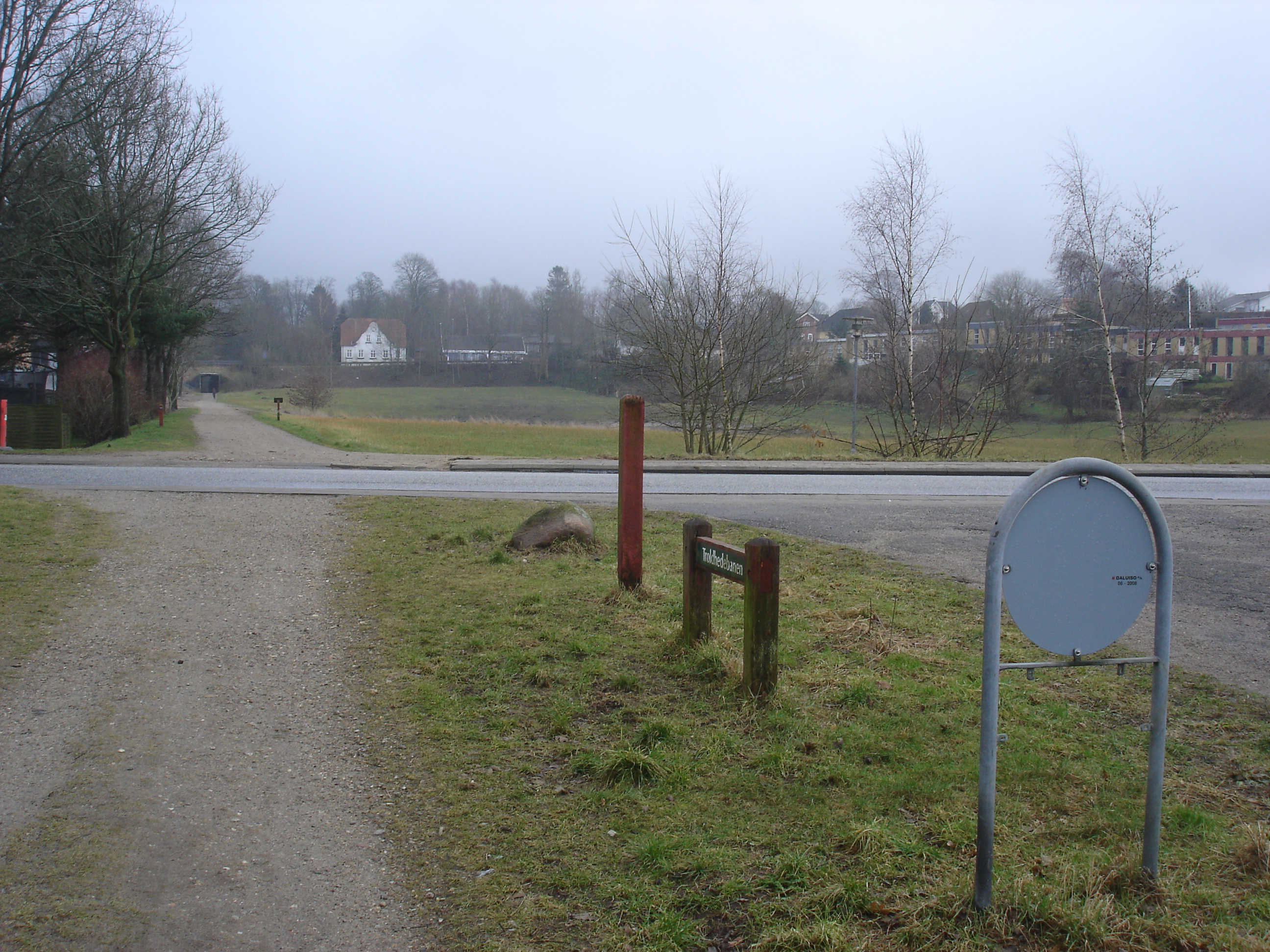 Troldhedebanestien krydser Paabyvej - forude lå Bramdrupdam trinbræt